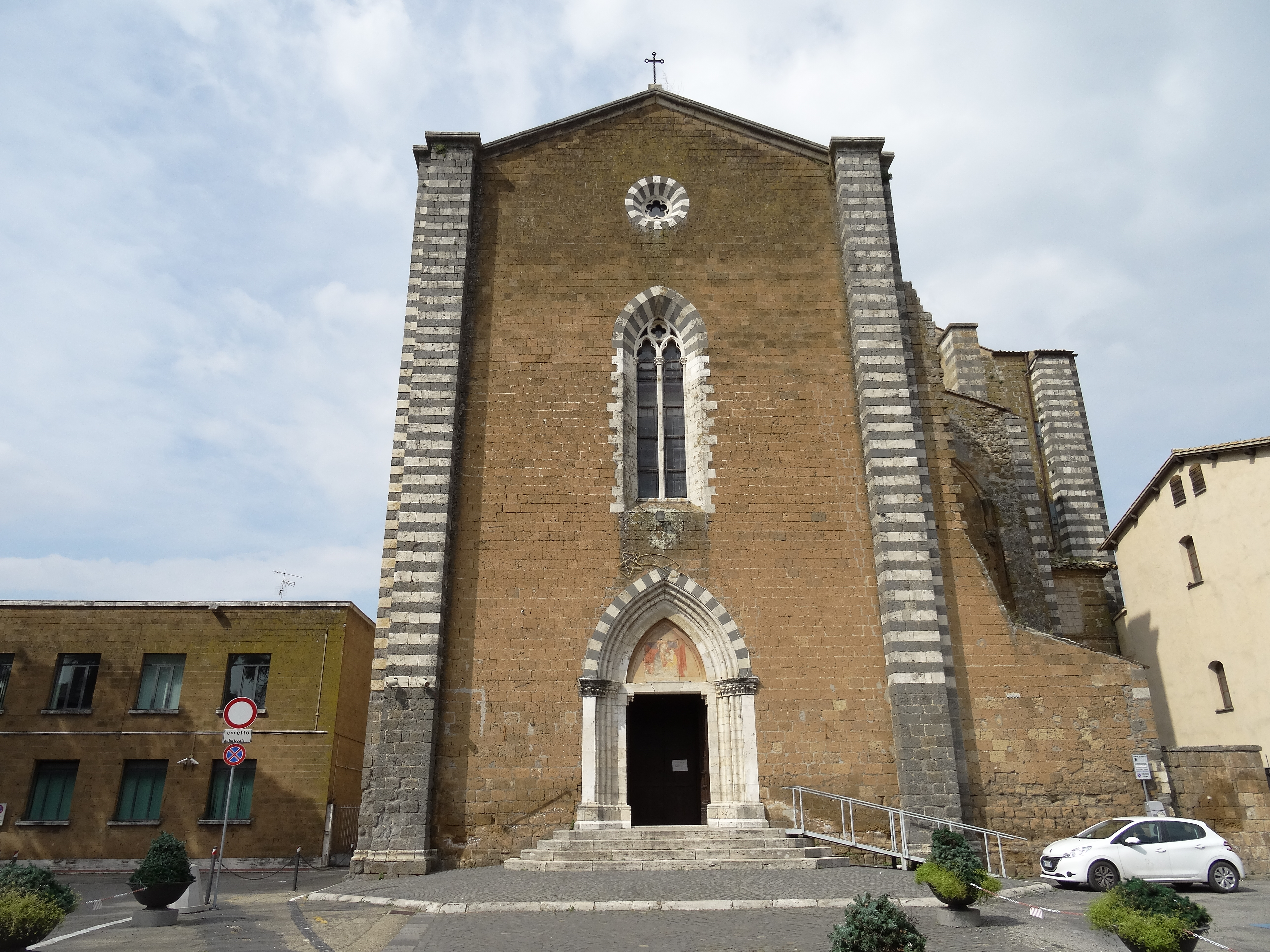 Orvieto